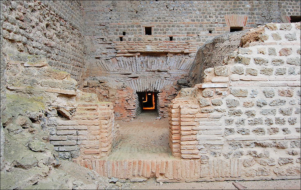 Thermes romains de Chassenon, le foyer et son environnement.